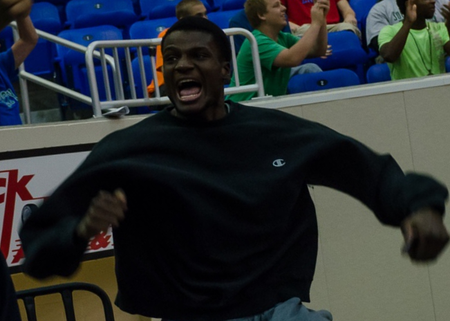 Norelia in 2013